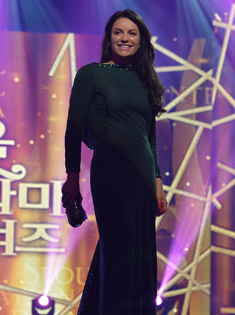 2012: Internationaler Drama Award * Seoul – Korea * Hannas Entscheidung * Beste Schauspielerin